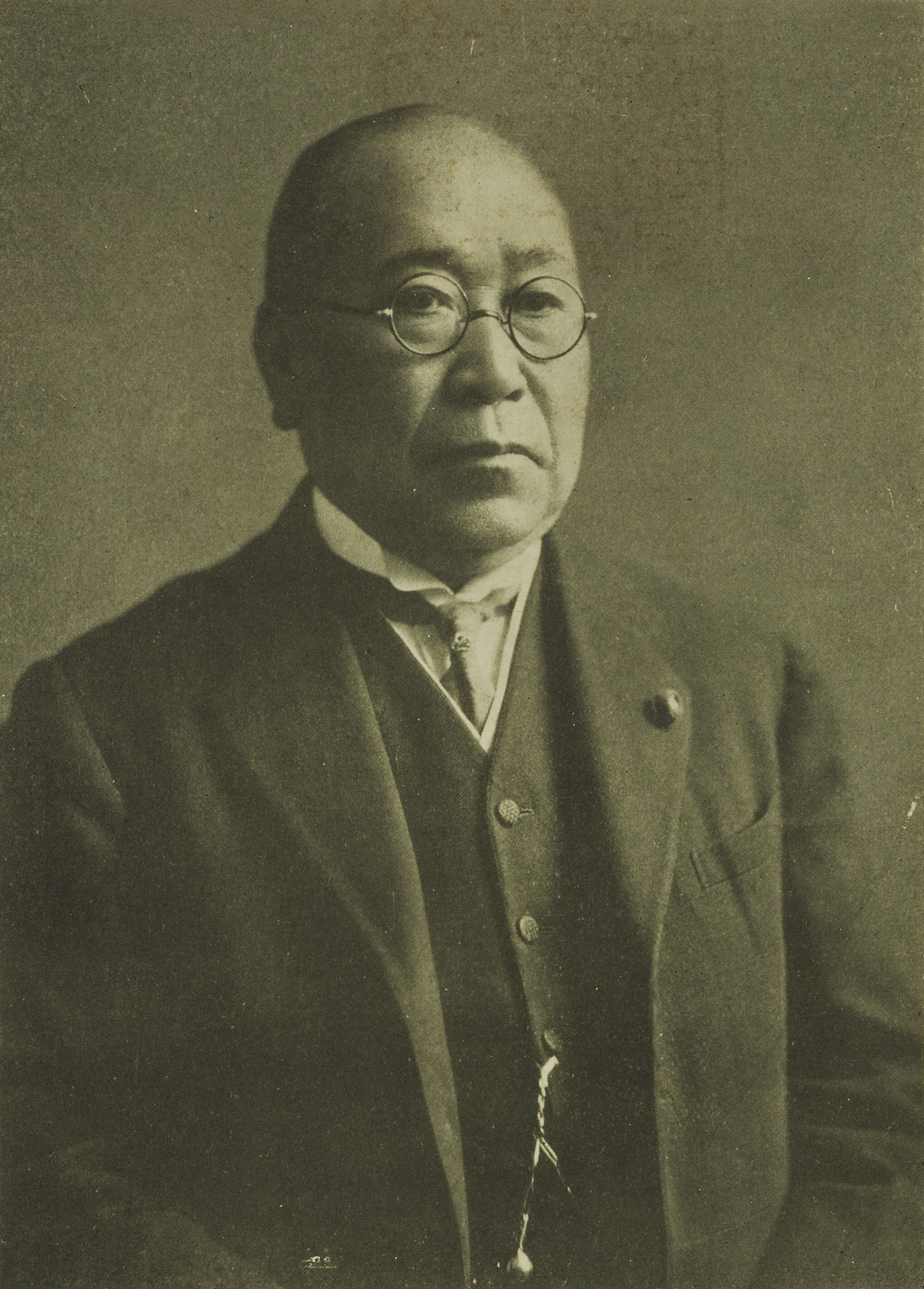 Portrait of Kataoka Naoharu (片岡直温, 1859 – 1934)